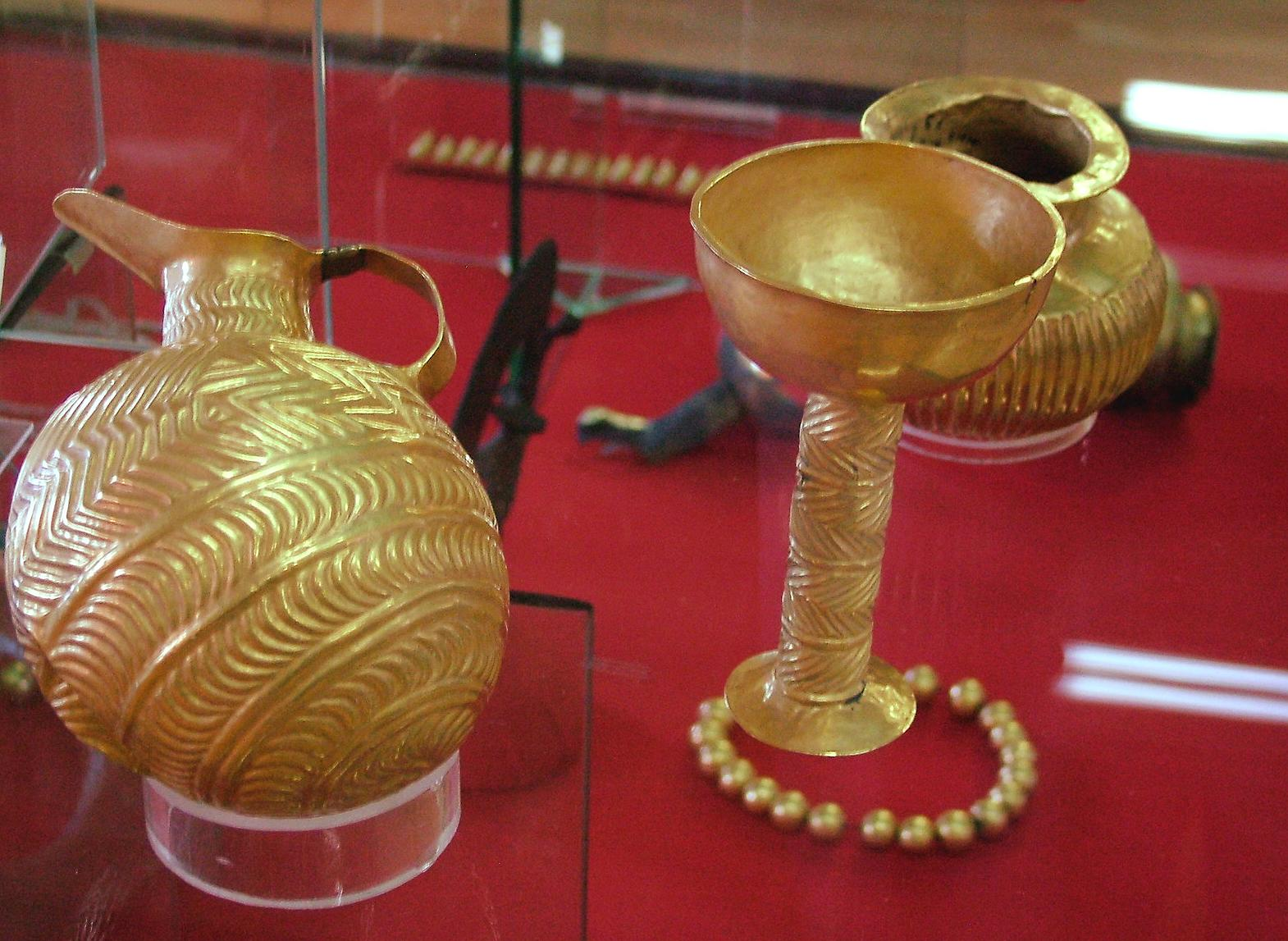 Bronzkori aranyedények az Anatóliai Civilizációk Múzeumában (Ankara, Törökország)